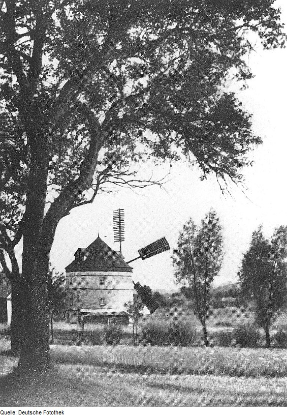 Original image description from the Deutsche Fotothek Horni Podluzi (Obergrund)-Svetlik (Lichtenberg). Holländermühle, Baujahr 1843, seit 1945 ungenutzt, aus: Warnsdorf 1935. Ein kleiner Reiseführer